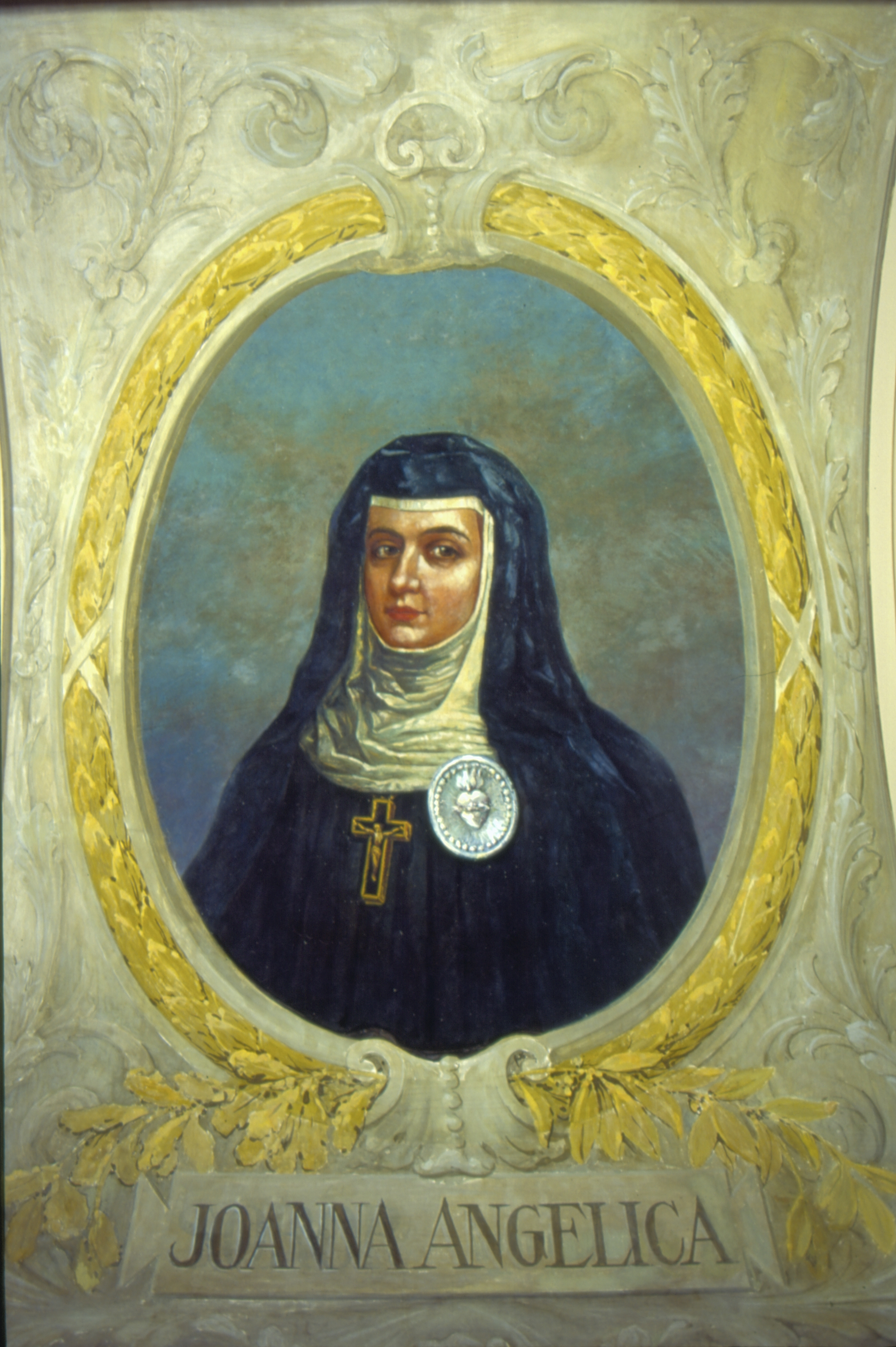 Obra que integra o acervo do Museu Paulista da USP. Coleção Fundo Museu Paulista - FMP